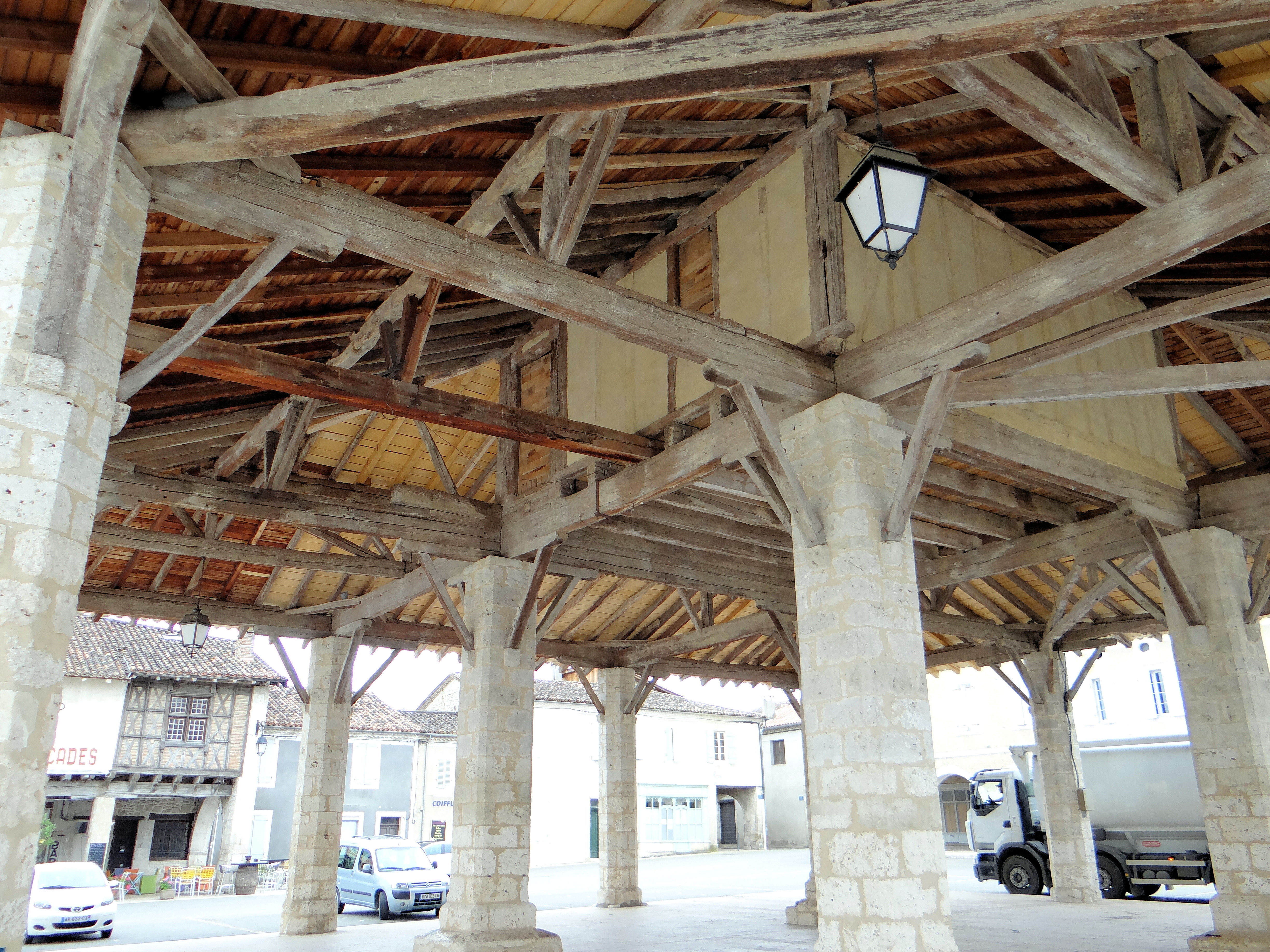 Halle de Solomiac - Charpente et salle construite sous la toiture